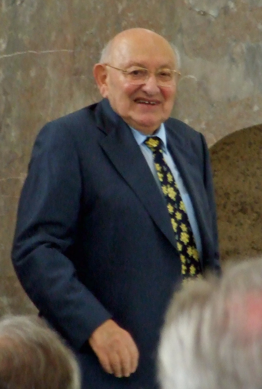 Marcel Reich-Ranicki, waehrend der Boerne-Preis-Feier, 2007 in Ffm